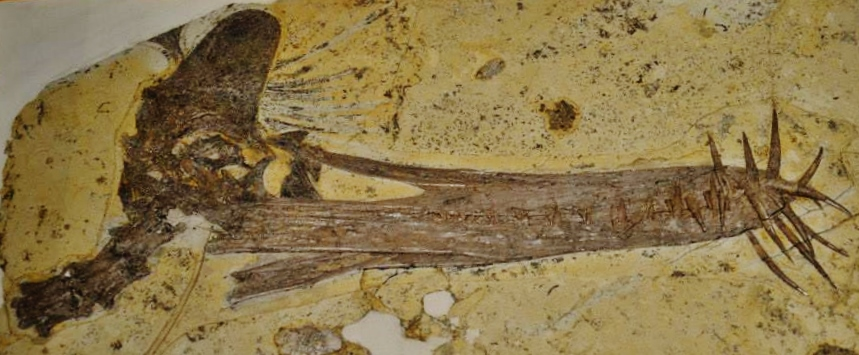 Fossil of Guidraco, an extinct reptile- Picture at Bejing Museum of Natural History